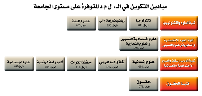 عروض ل م د